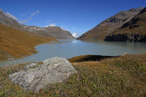 Lac des Dix mit Blick Richtung Staumauer